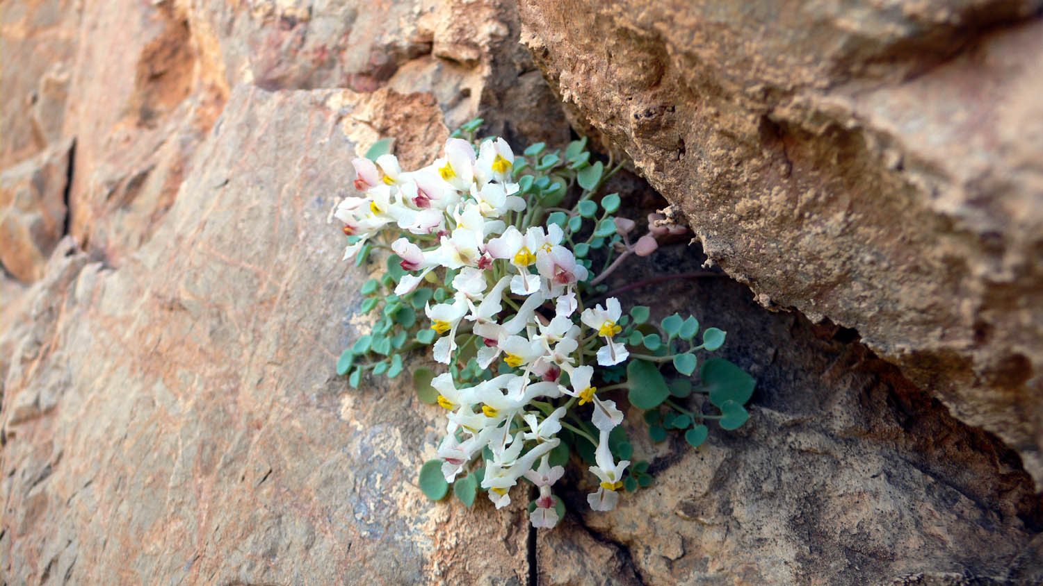 Sarcocapnos enneaphylla subs. saetabensis (Zapaticos de la Vírgen) en Cala Cerrada. Parque Natural de la Sierra de la Muela de Cartagena.